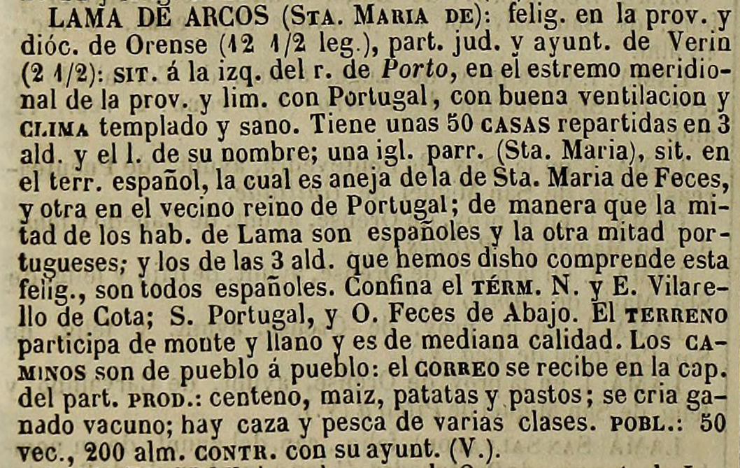 Lamadarcos no Diccionario geográfico-estadístico-histórico de España y sus posesiones de Ultramar.